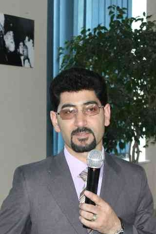 سعید مولیانی